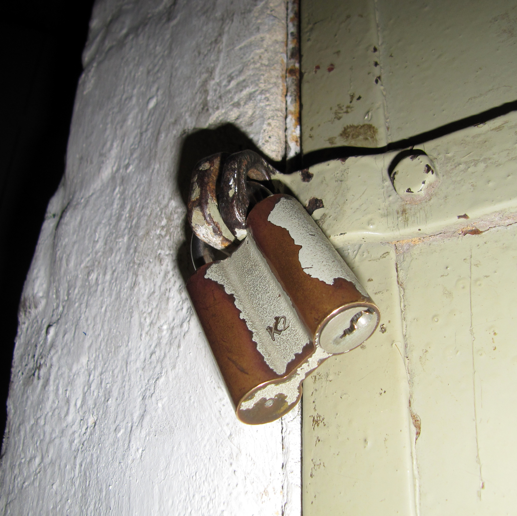 K2-Vorhängeschloss Hamburg